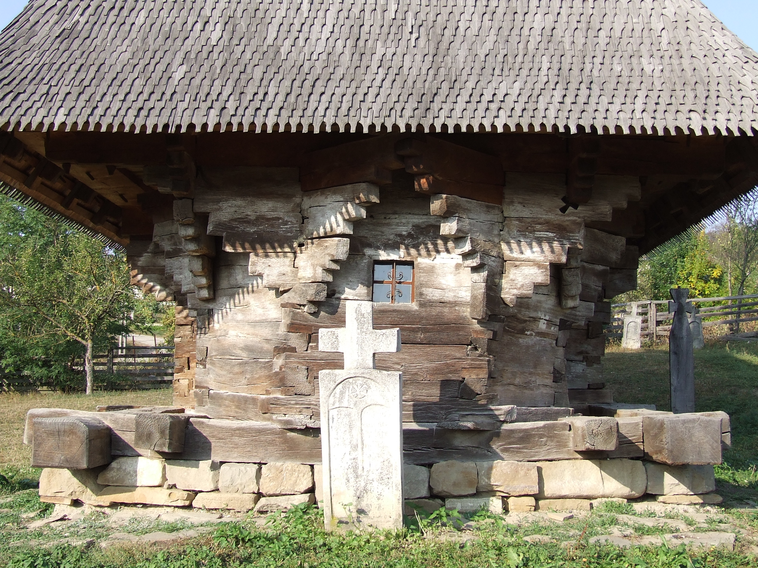 Biserica de lemn din Baica, judeţul Sălaj. Absida altarului.